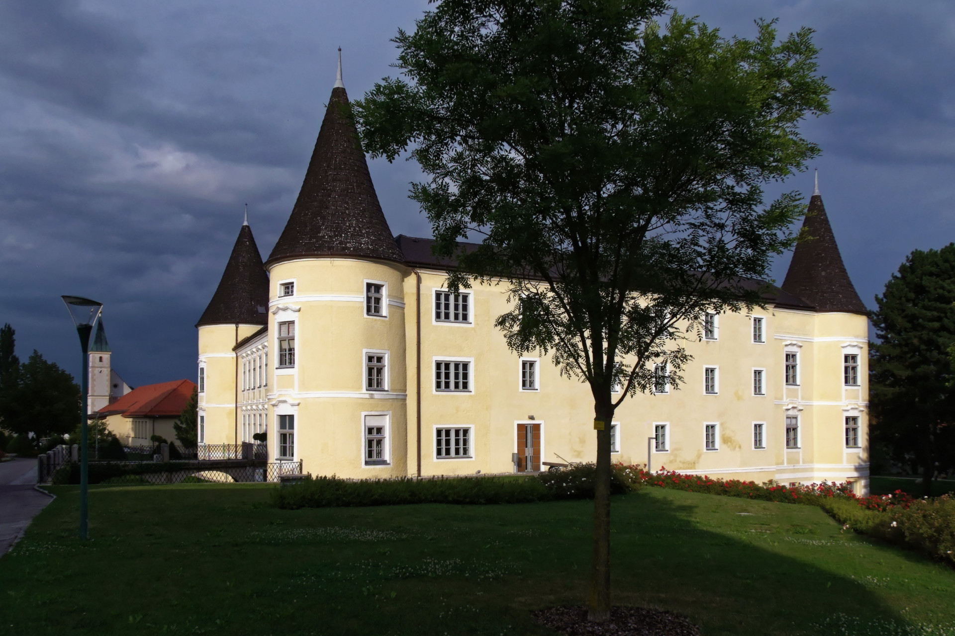 Schloss Weinzierl/ Höhere landwirtschaftl. Bundeslehranstalt Francisco-Josephinum